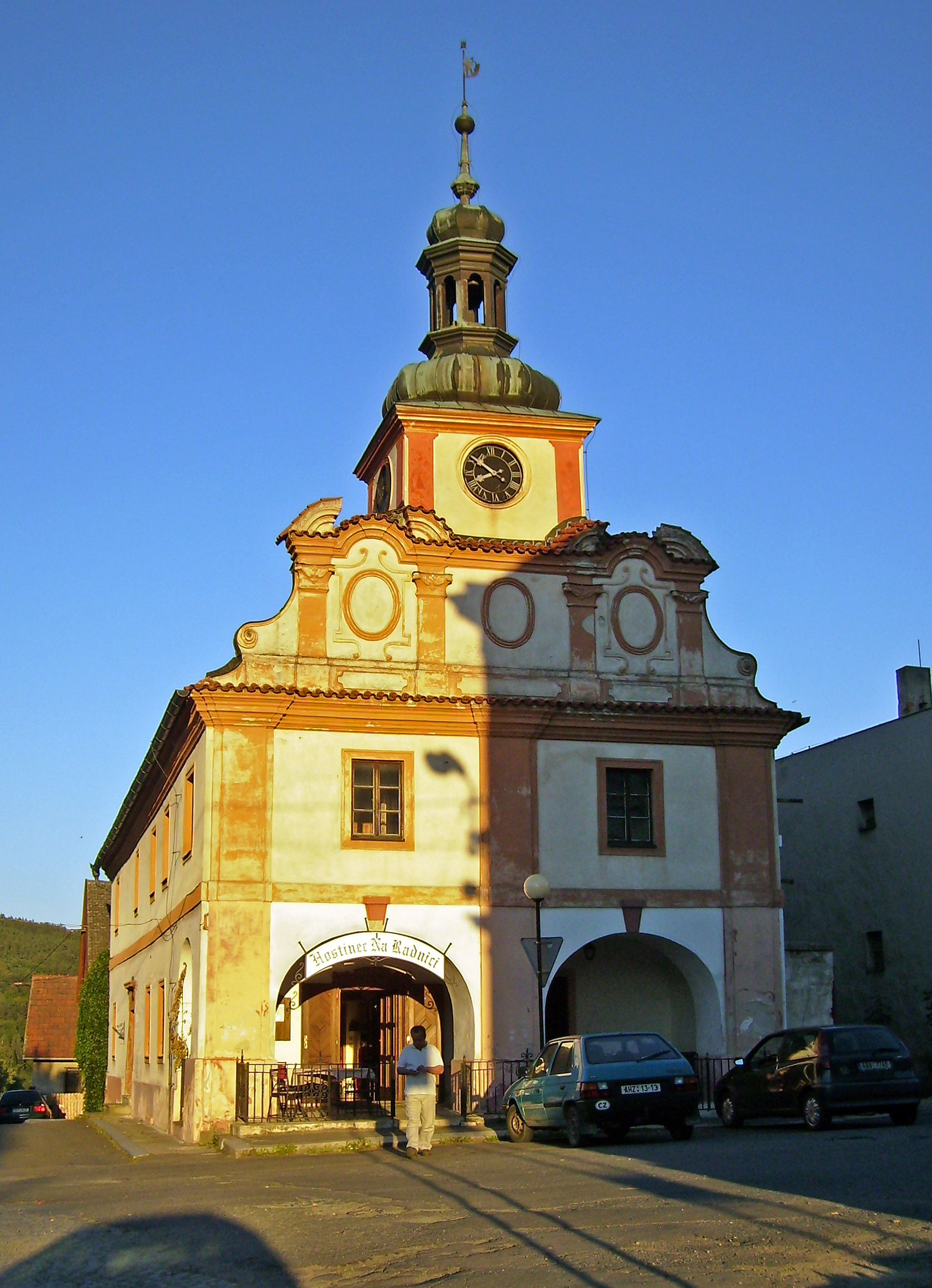 Česky: Stříbrná Skalice, okres Praha-východ. Radnice, Na městečku čp. 19.